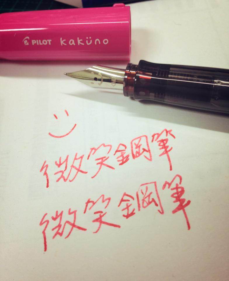 中文（台灣）: PILOT第一代微笑鋼筆